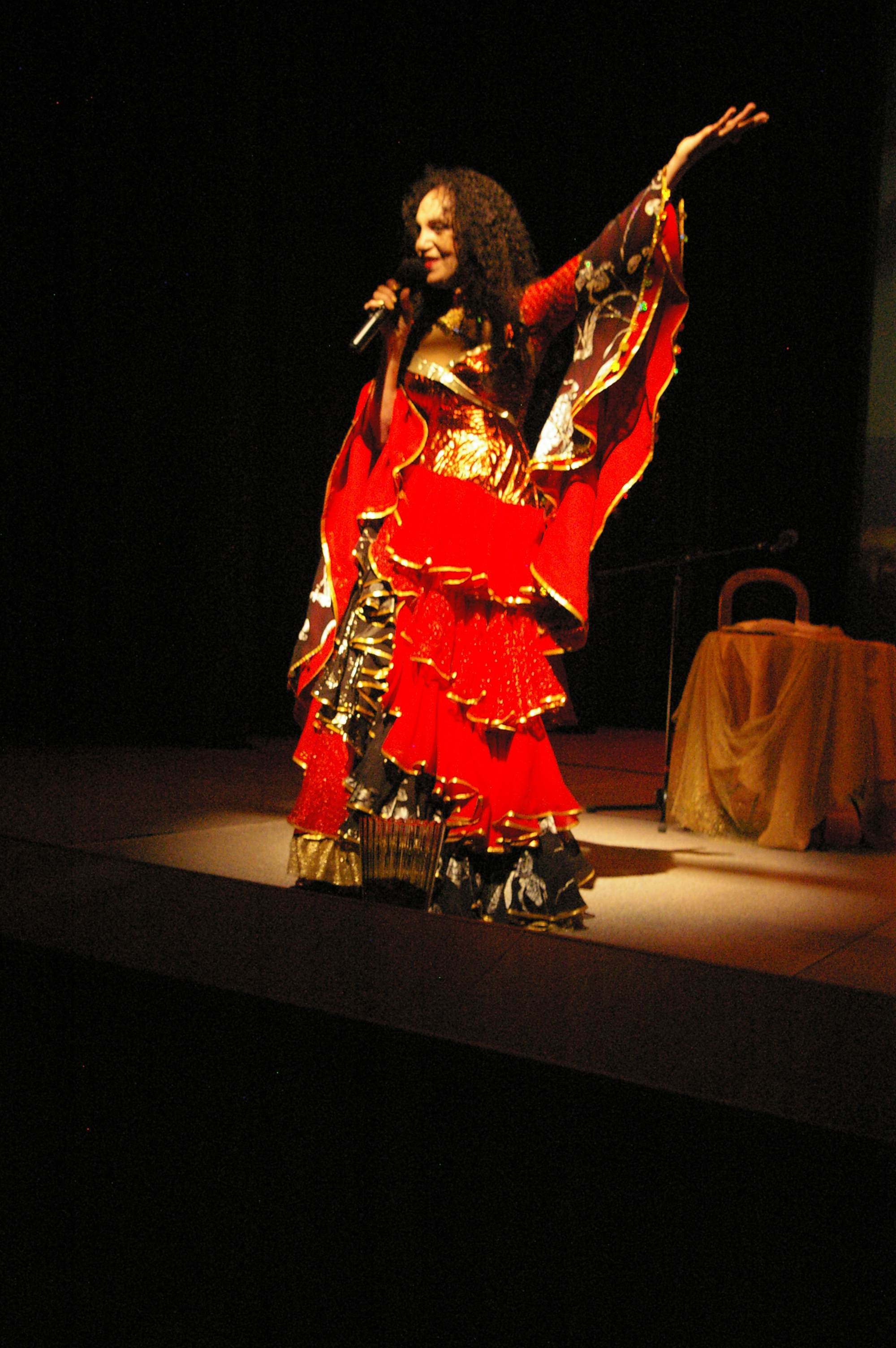 Валентина Пономарёва. Концерт в Вильнюс - 2011г.